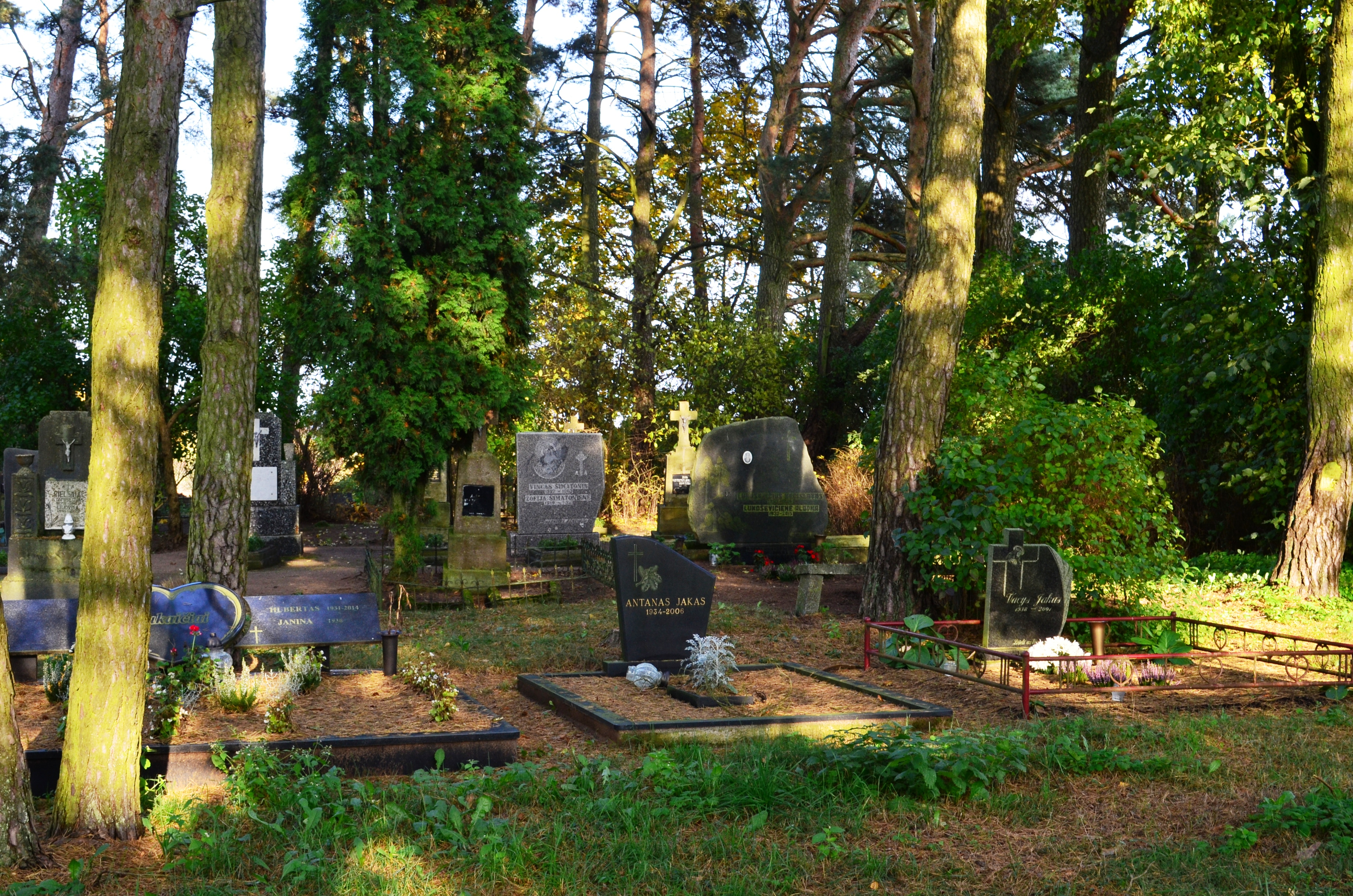 Bajėniškio (prie Aristavos) kapinės, Kėdainių raj.